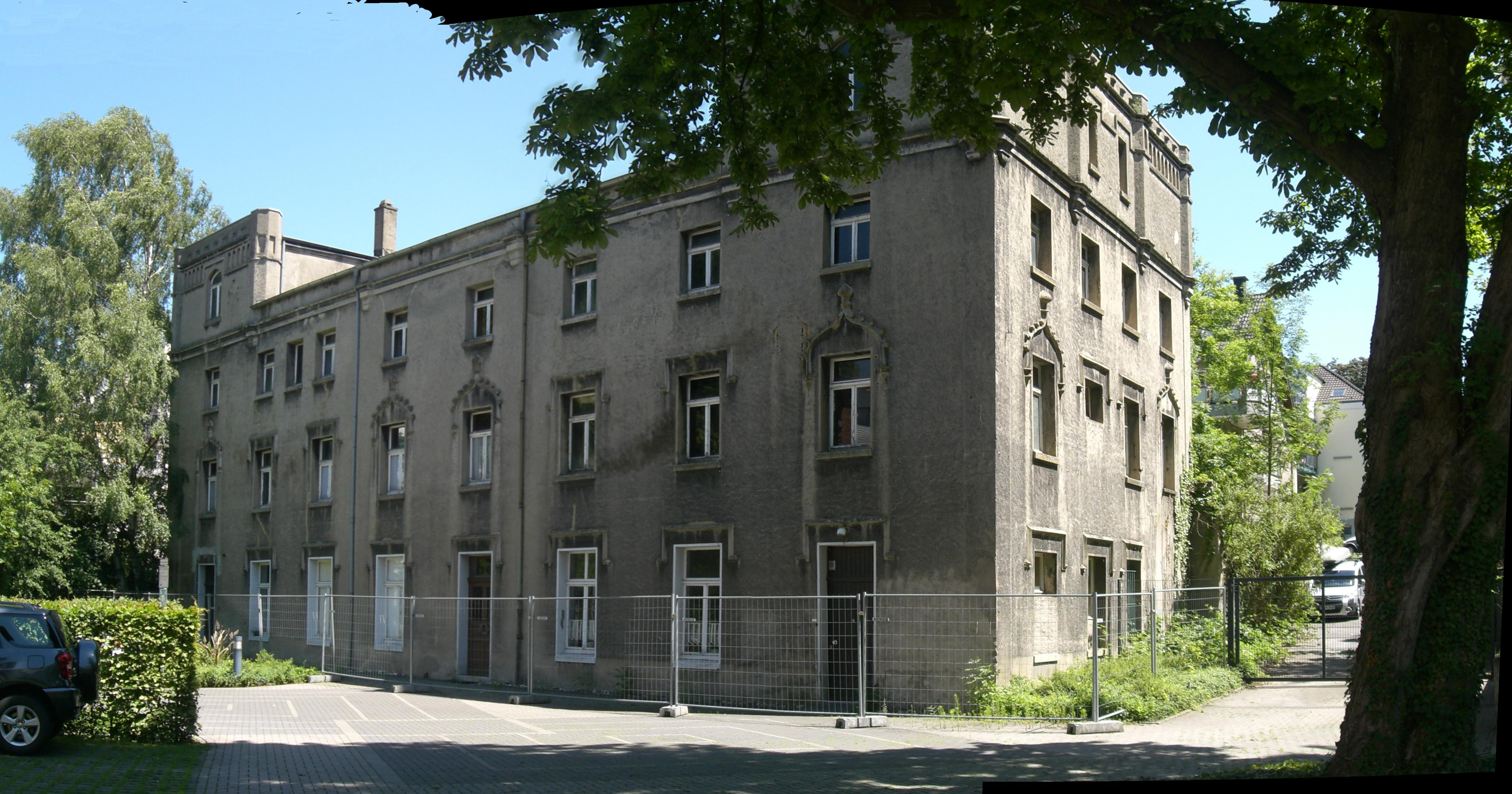 Troost’sche Textilfabrik